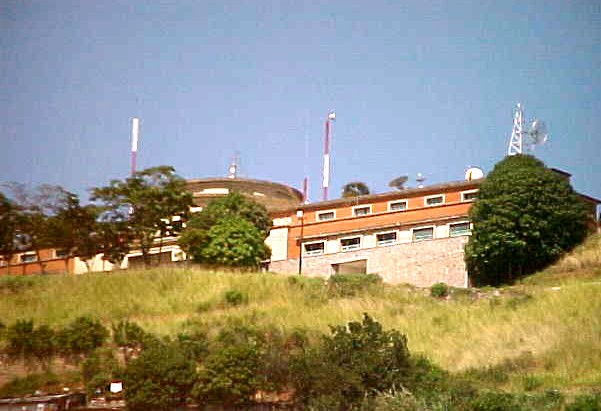 Observatorio Naval Cagigal en municipio Libertador, Distrito Federal - Venezuela